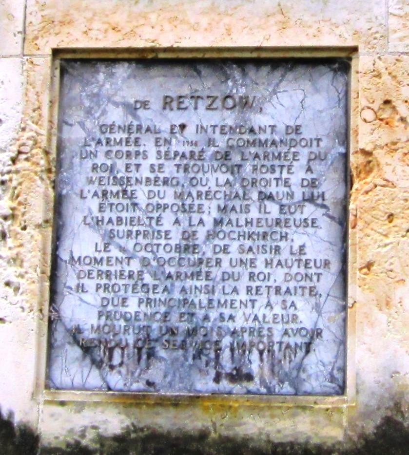 Ehrentafel für Wolf Friedrich von Retzow (1699-1758) am Obelisken in Rheinsberg